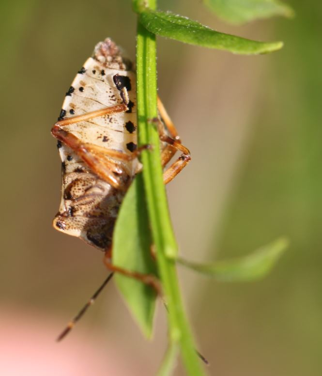 Baumwanze Pinthaeus sanguinipes an Besenginster am 6. Juni 2018 in der Schwetzinger Hardt